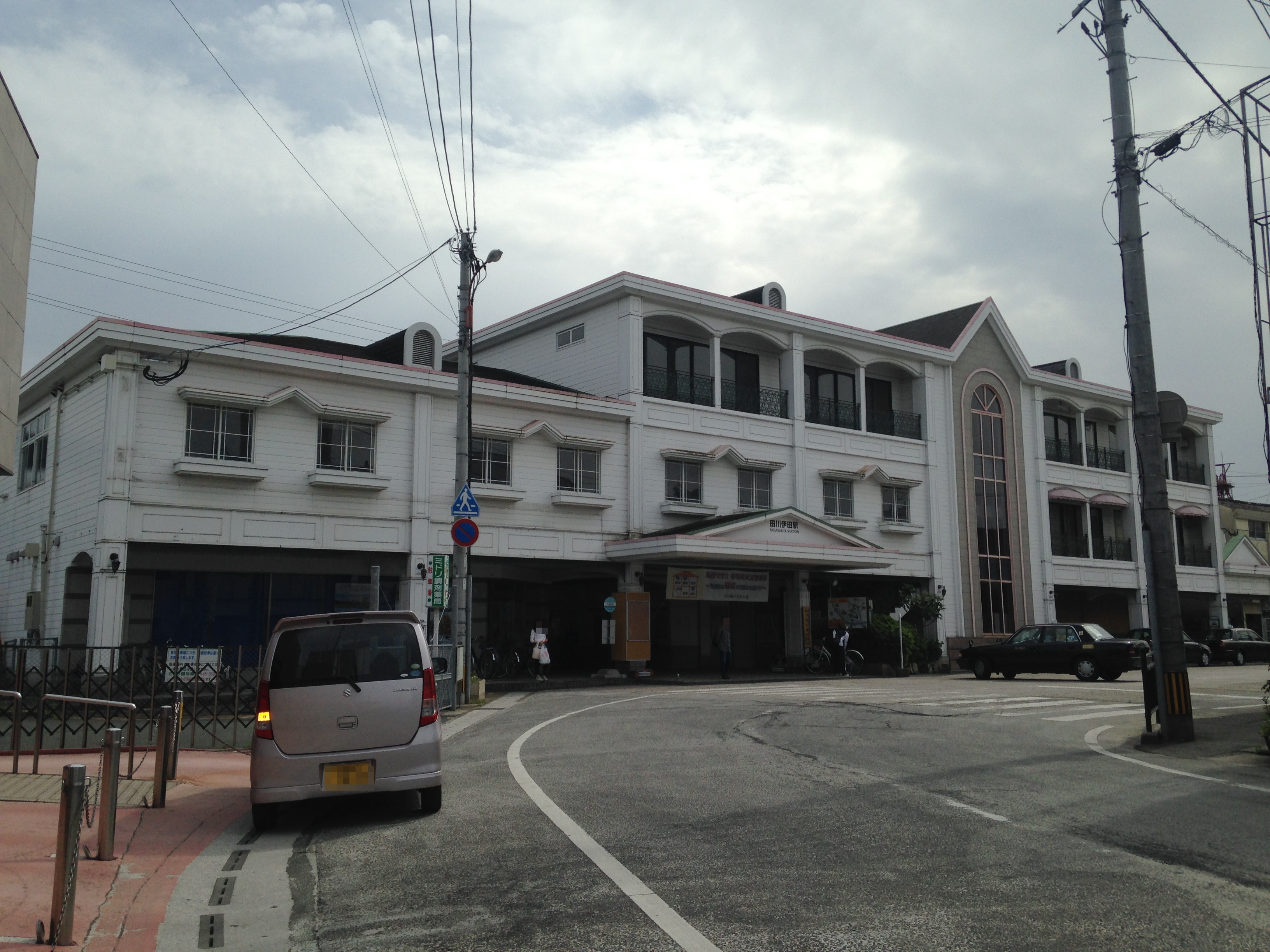 田川伊田駅駅舎